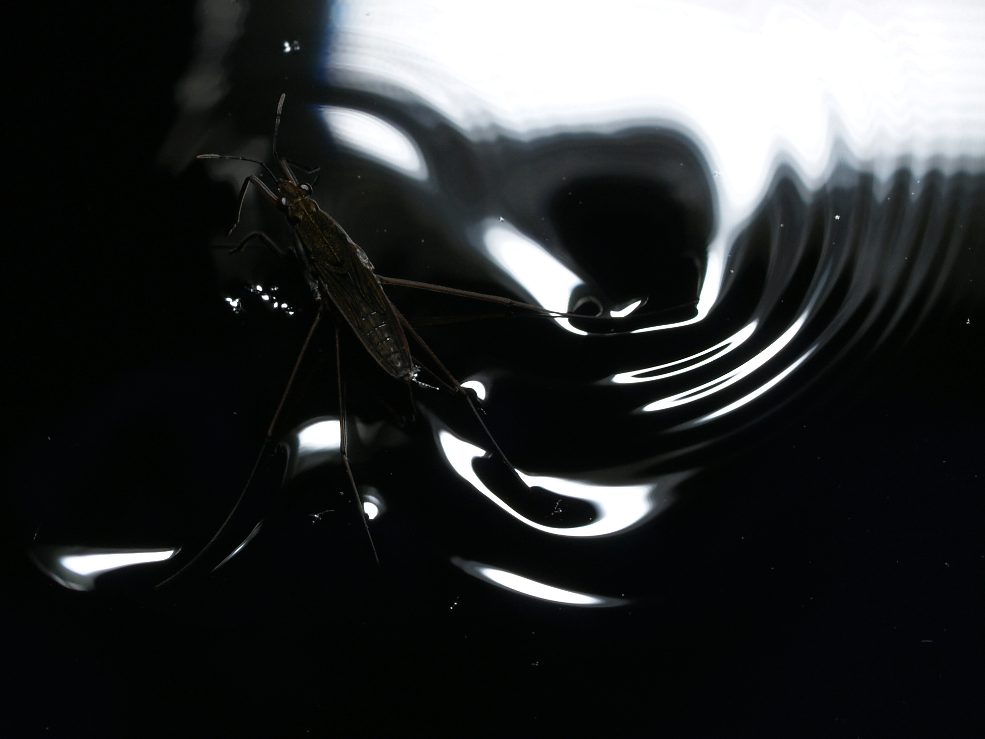 Wasserläufer beim Absprung von der Wasseroberfläche